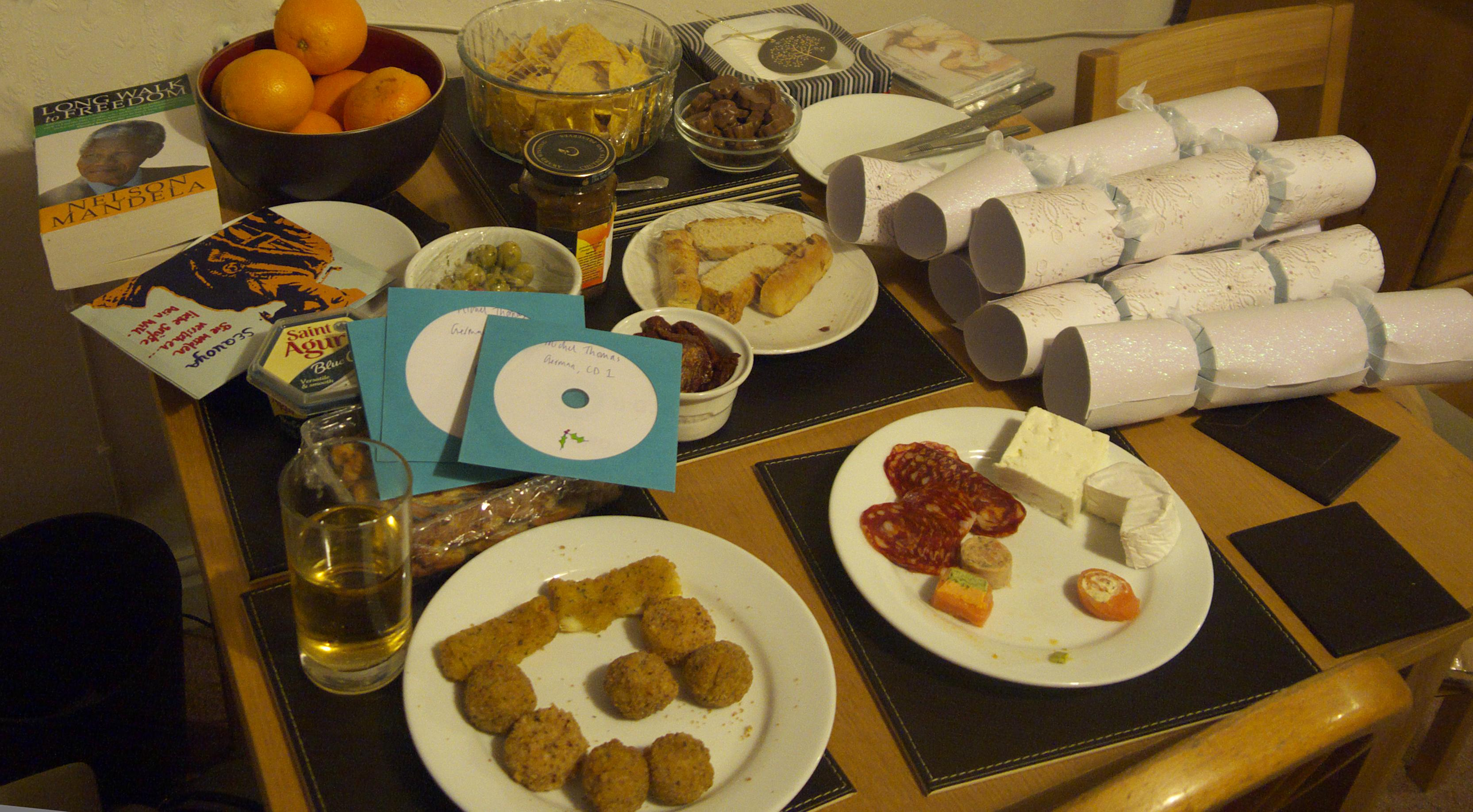 Kim's Game